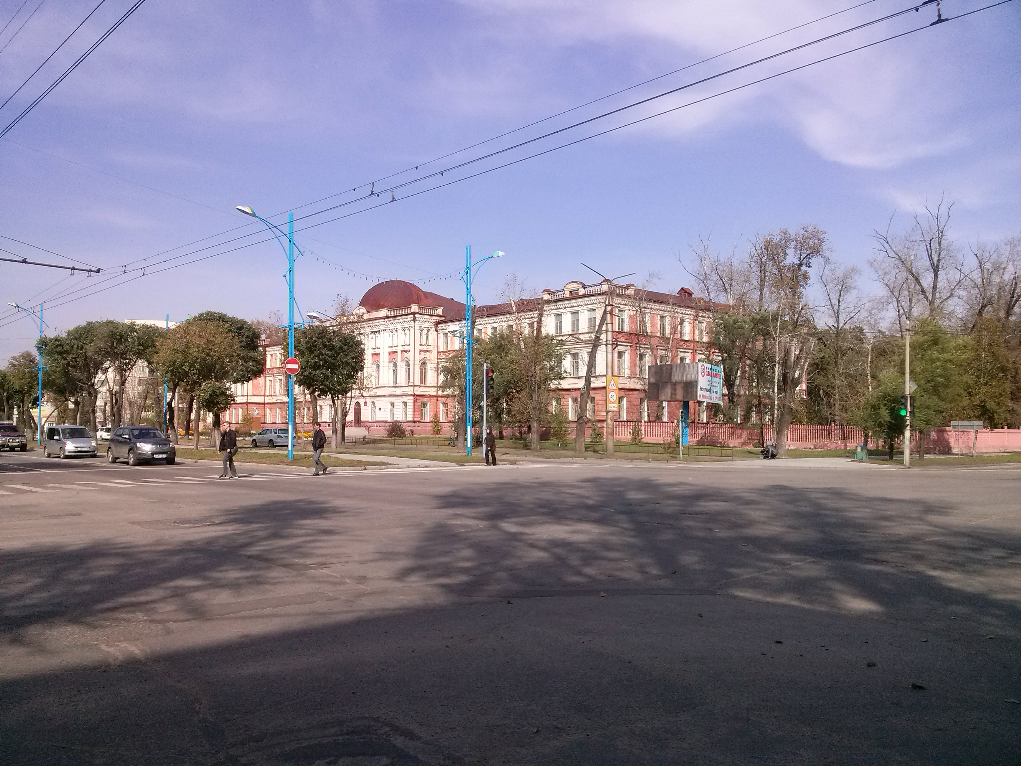 (Амурская область, Благовещенск, горького улица, 153)